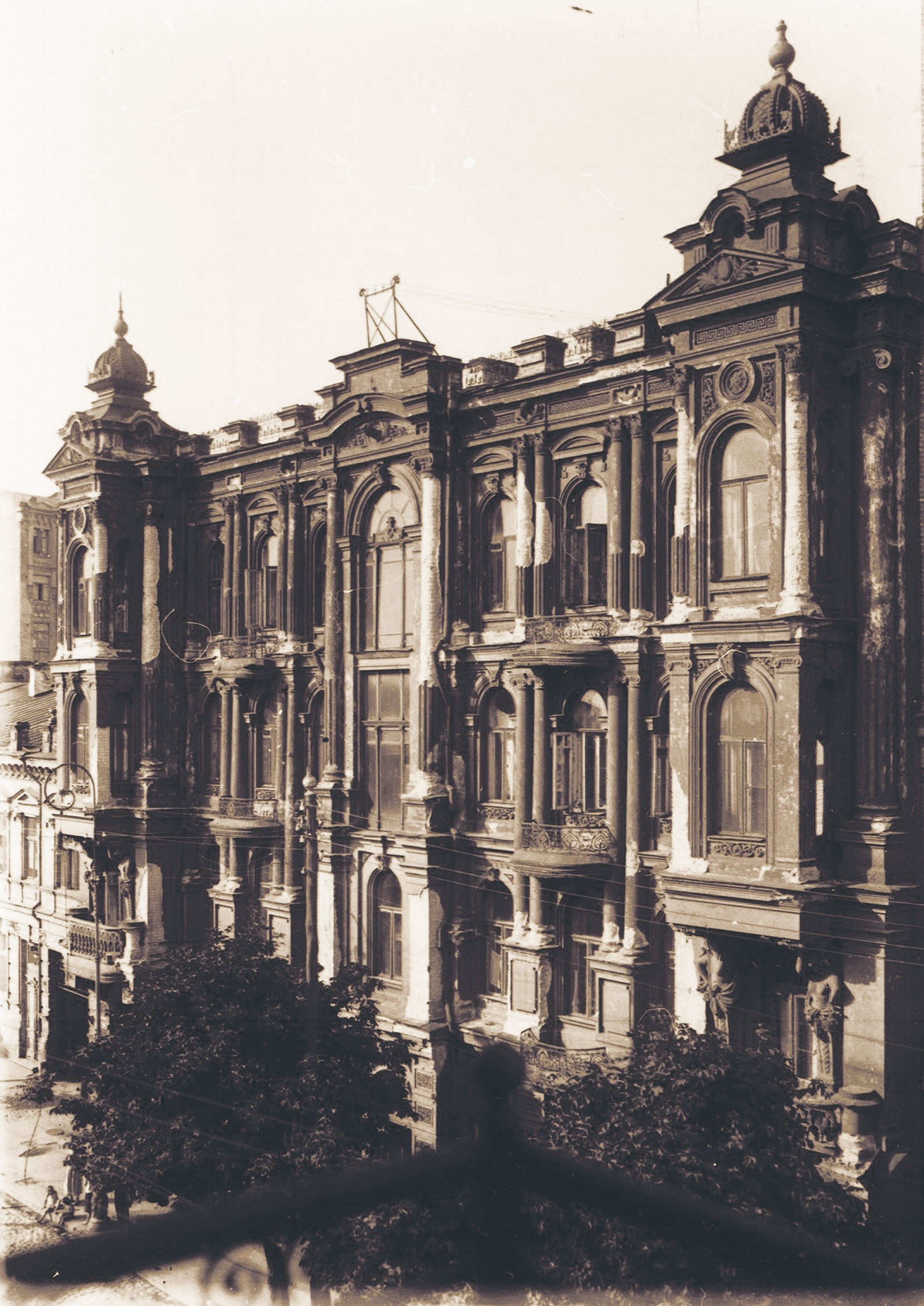 Київські прибуткові будинки, Ярославів Вал вул., 16-а